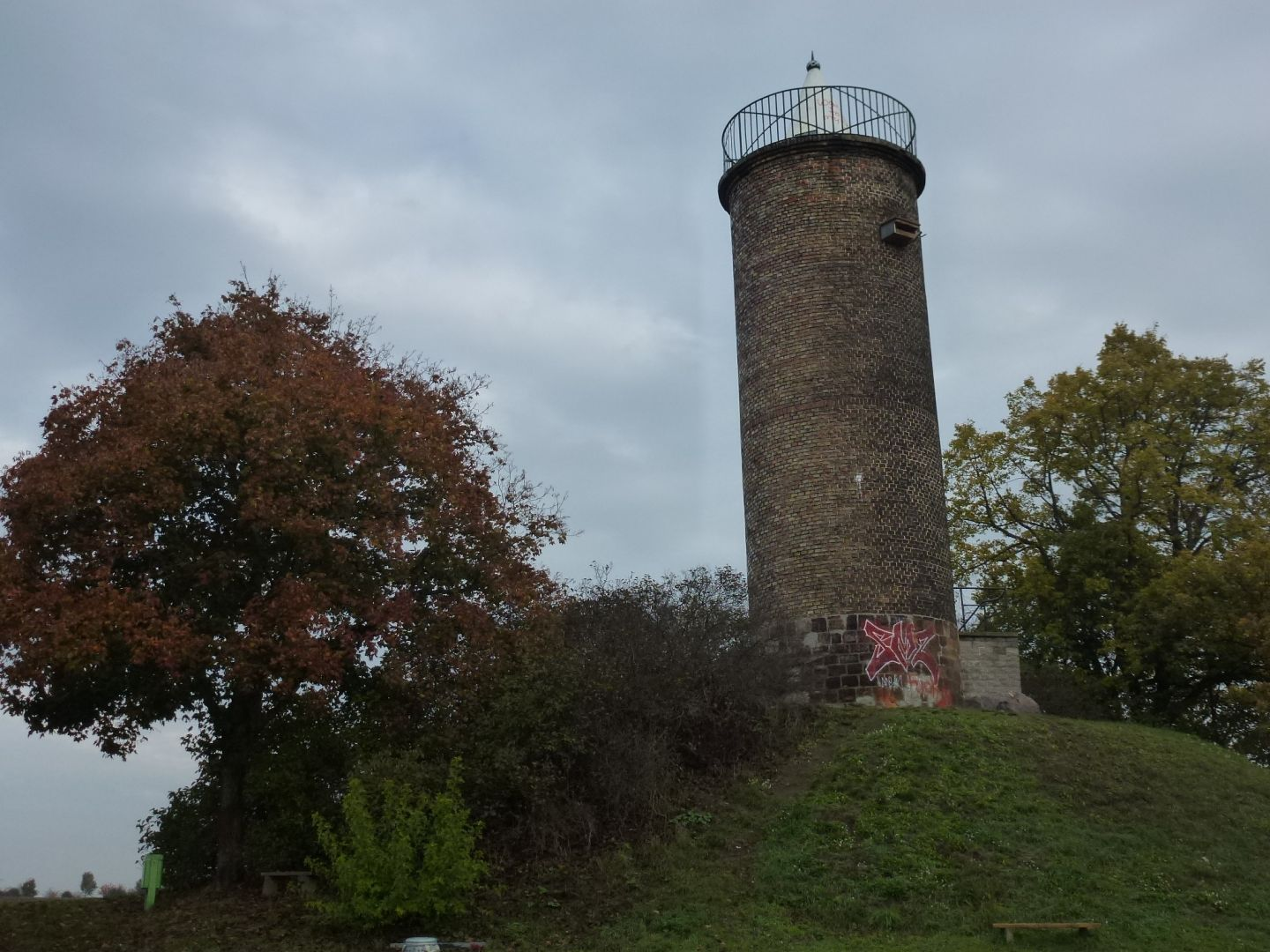 Turm in Markwerben, 1881 erbaut